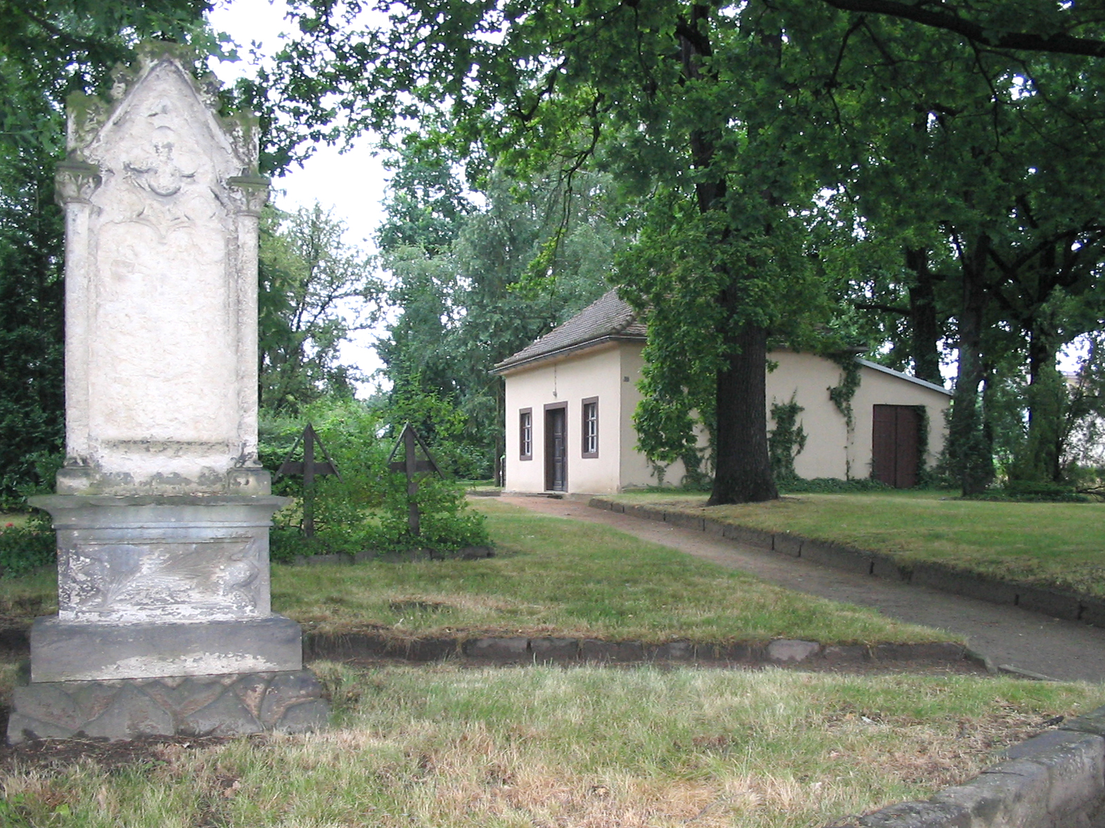 Radebeul Parentationshalle Alter Friedhof (Kötzschenbroda)